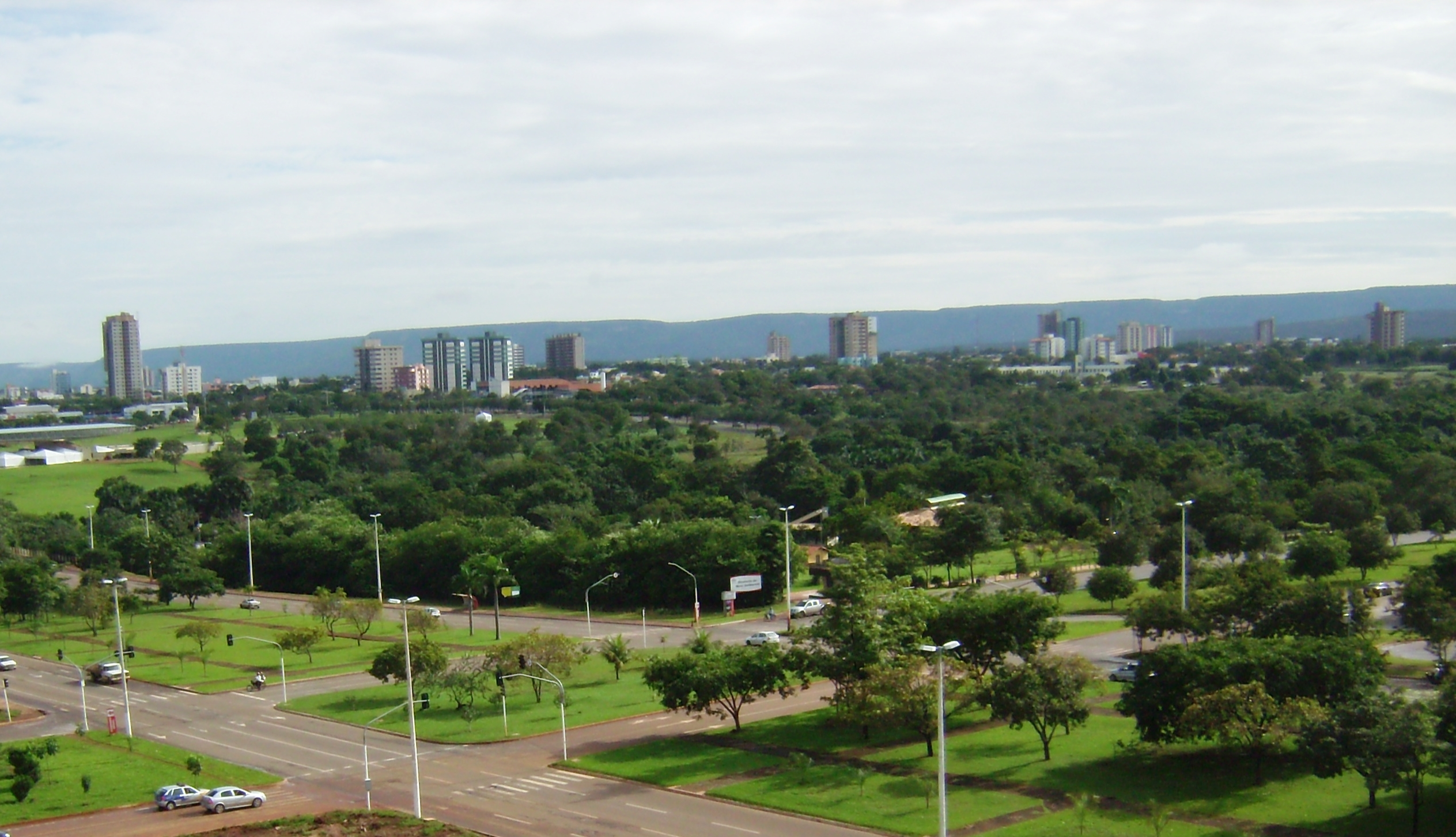 Vista da Avenida Teotônio Segurado em Palmas, Tocantins, Brasil.